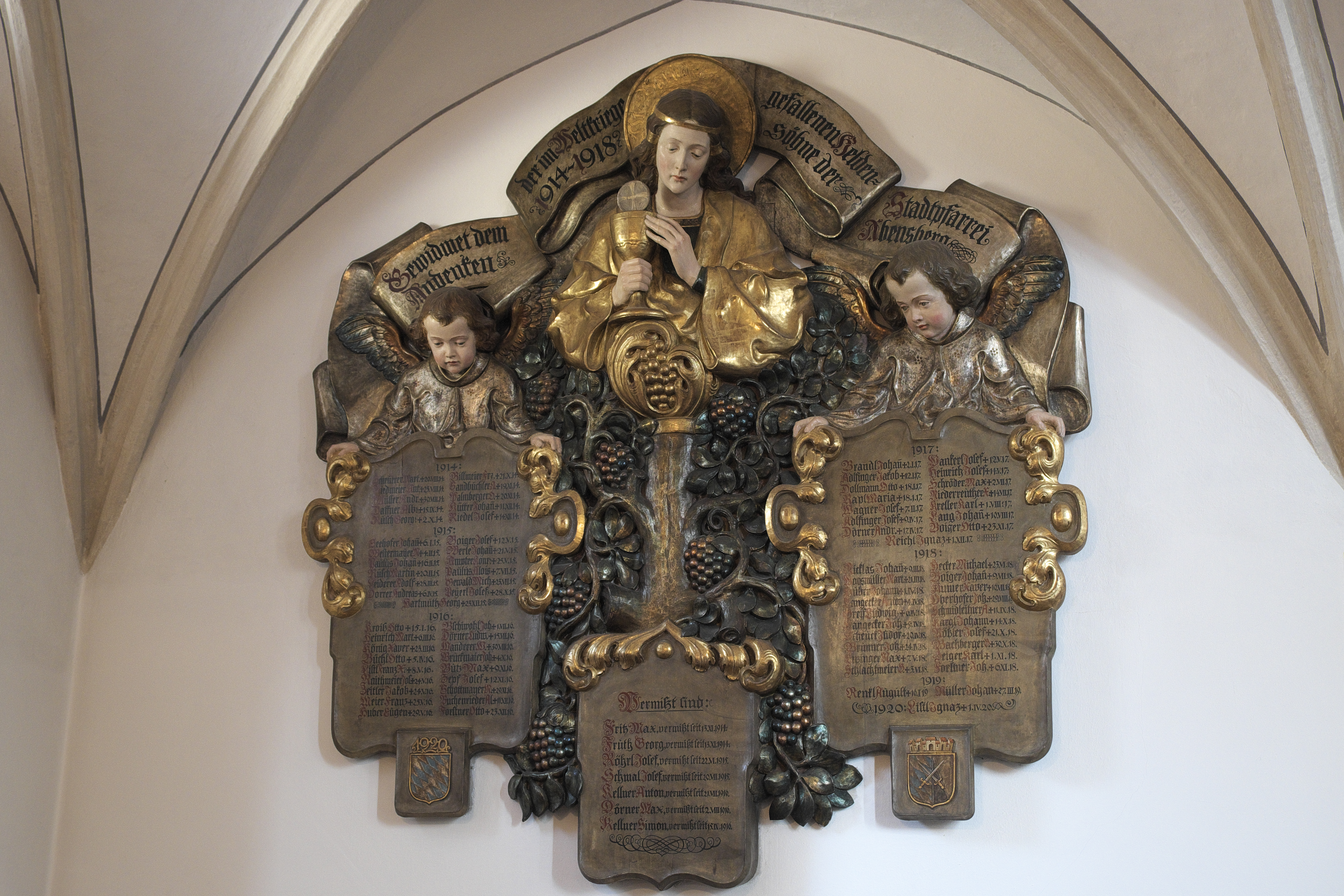 Katholische Pfarrkirche St. Barbara in Abensberg im Landkreis Kelheim in Niederbayern (Bayern), Kriegerdenkmal